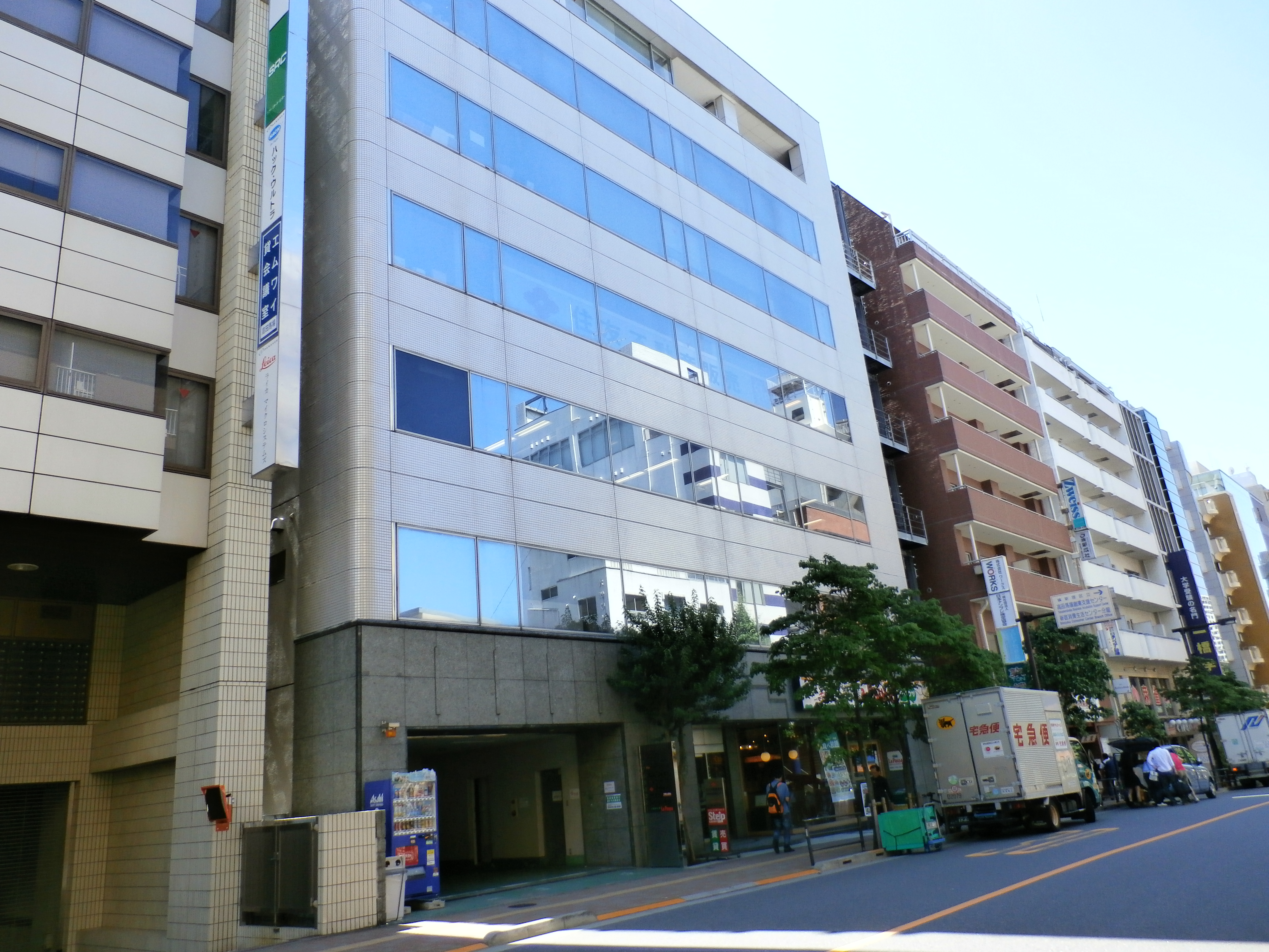 日本文化センター本社の入居する新宿東豊ビル